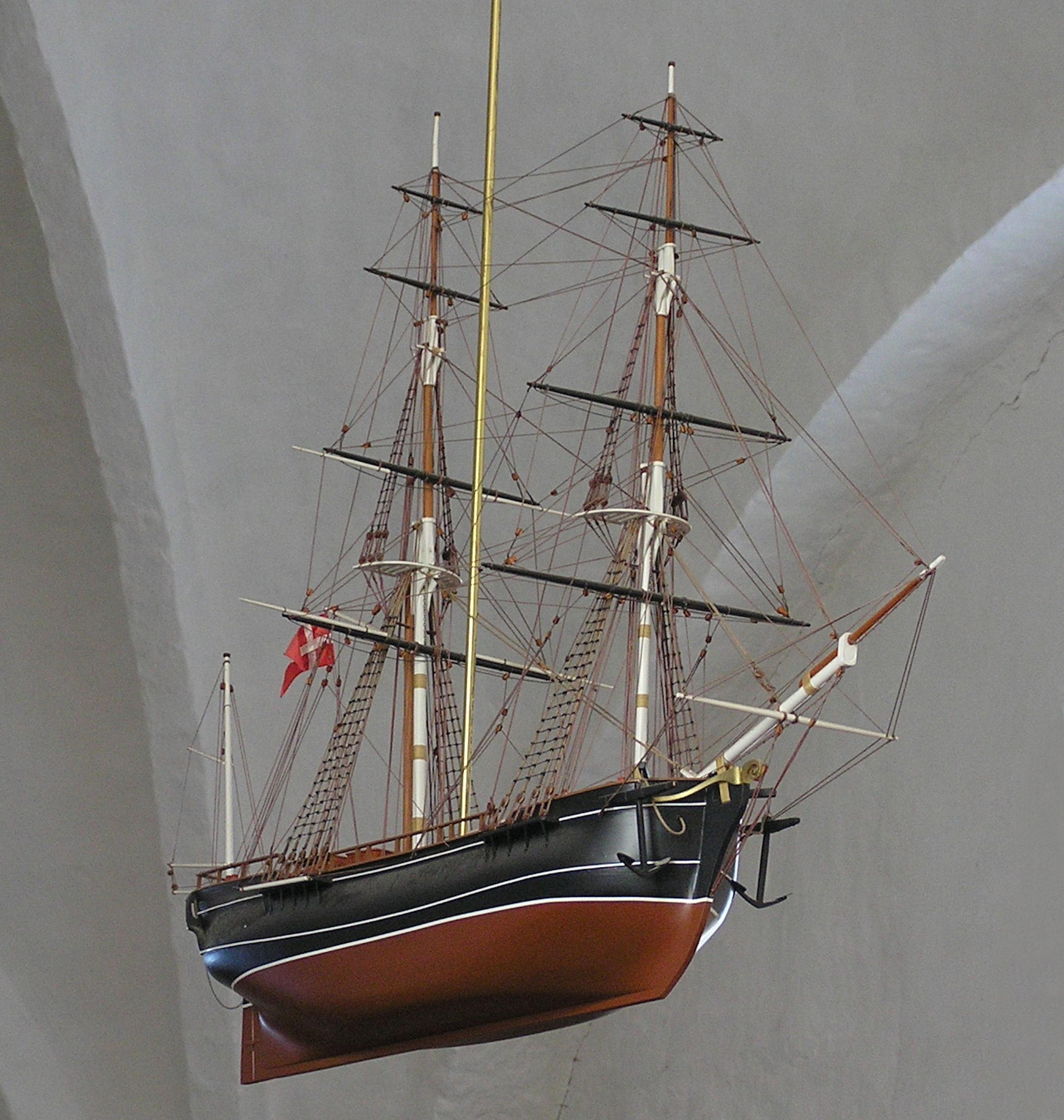 ‘Enigheden’, 2 master snaubrig bygget af maler Ove Andersen, Slagelse i 1992 Ophængt 1992-03-26 i Kastrup Kirke, Vordingborg, Sct Clementsvej 66, 4760 Vordingborg Doneret af Niels Jørgen Jørgensen, Nr. Alslev, Falster. N.J. Jørgensen voksede op med skibe både i kirken og på vandet. Senere blev han købmand i Kastrup. Handelsskibet ’Enigheden’ er bygget på Petersværft 1781, det første af de skibe, der blev færdige på dette værft. Værftet blev anlagt ved stranden mellem Langebæk og Stensby tæt ved Vordingborg. Skibet er tegnet af Henrik Gerner, flådens berømte skibskonstruktør på Holmen. Skibet afgik fra København i 1781 til Dansk Vestindien med en besætning på tyve mand.